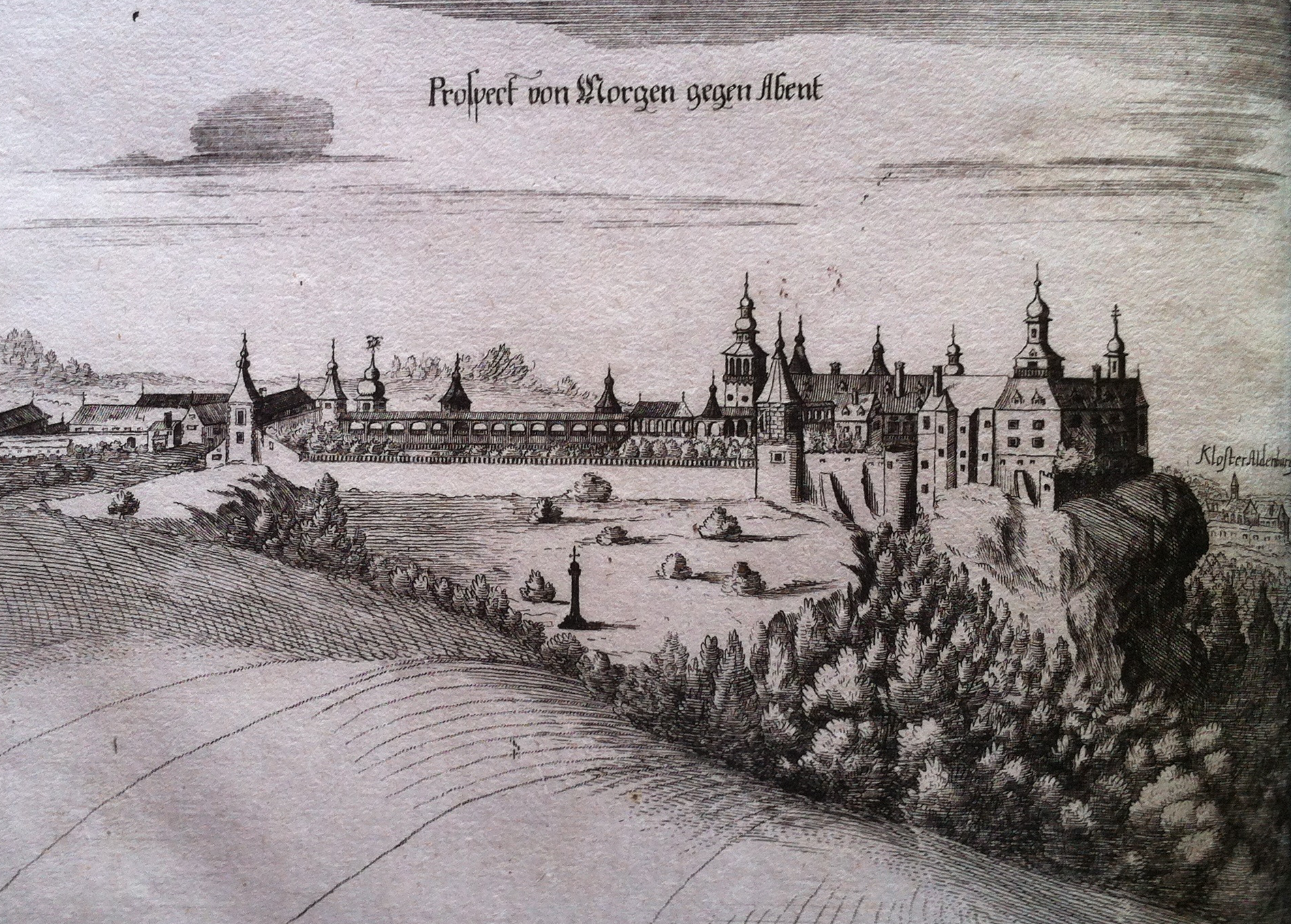 Schloss Rosenburg gegen Westen in der Topographia Windhagiana Aucta, Wien 1673.